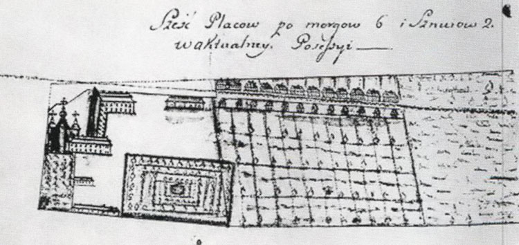 Беларуская (тарашкевіца): Халопенічы (Chałopieničy). Касьцёл і кляштар дамініканаў